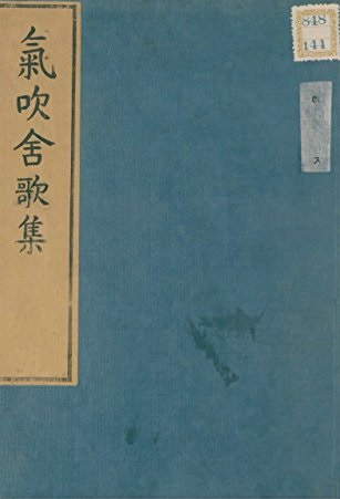 『気吹舎歌集』（気吹舎刊行物）